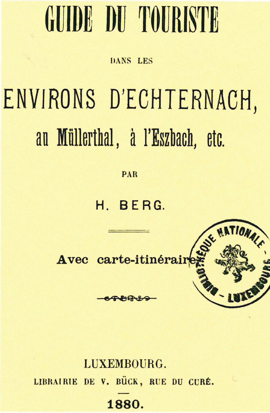 Page de titre du guide touristique publié en 1880 par Hubert Berg (1825-1903).